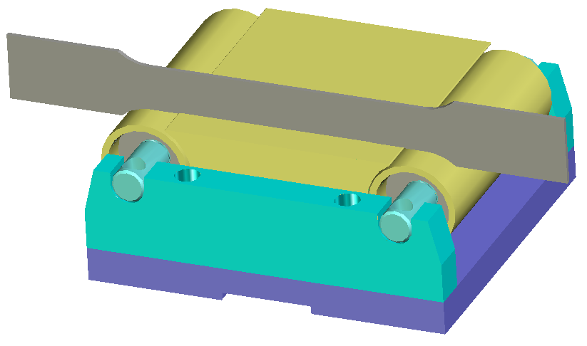 Schleiftechnik an Maschine